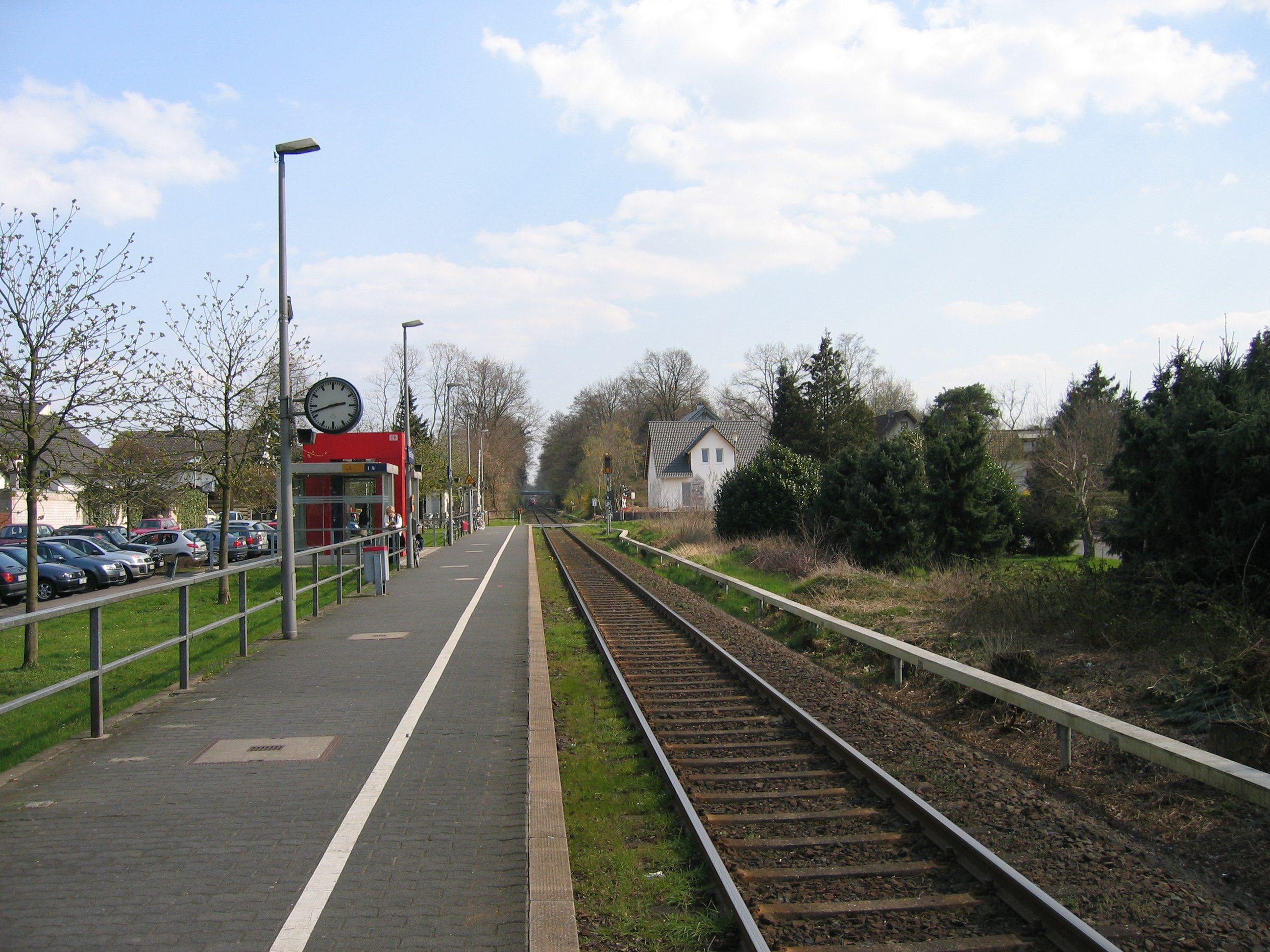 Bahnhof Rösrath-Stümpen